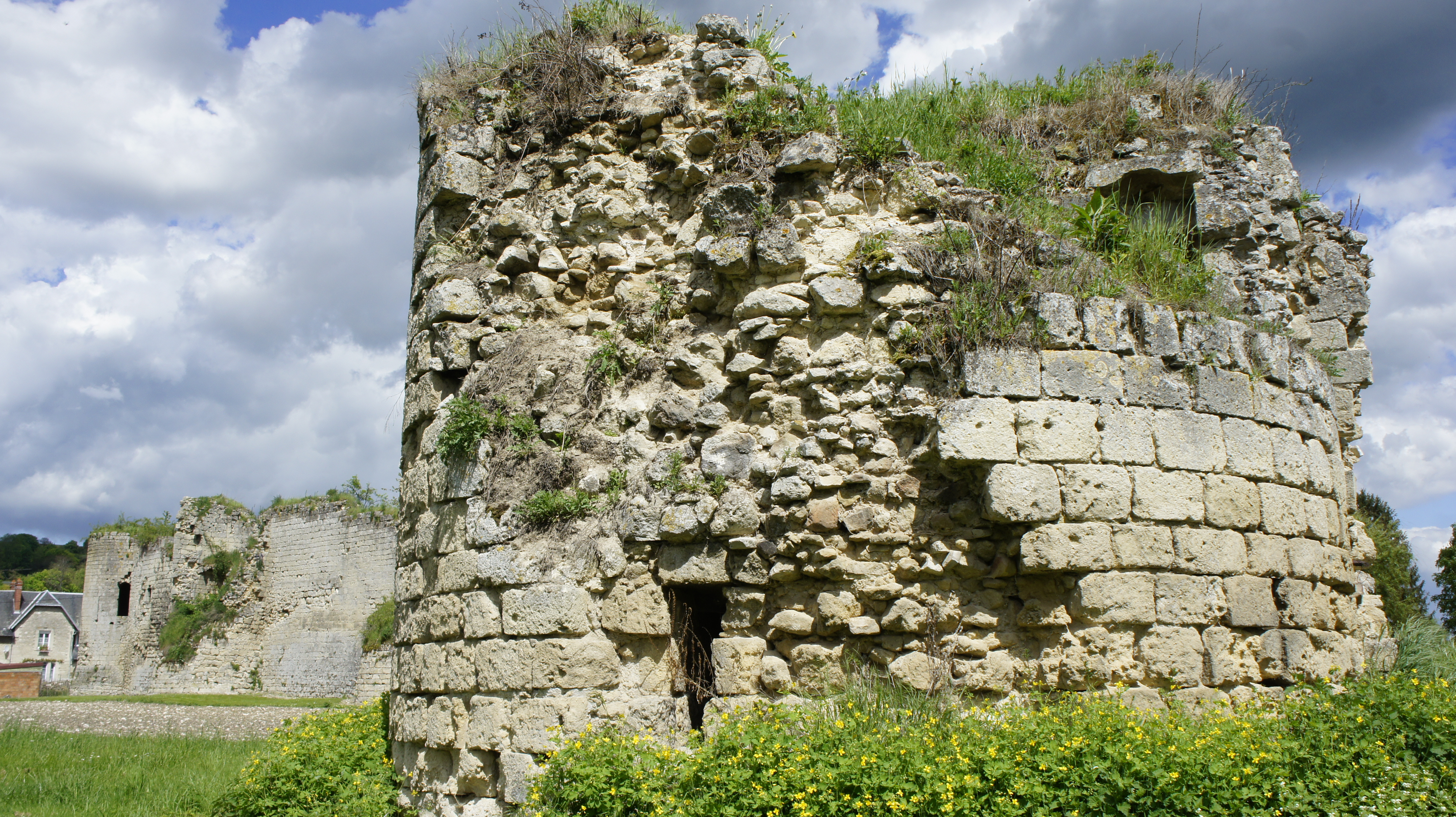 Vue_sud_ouest du château .